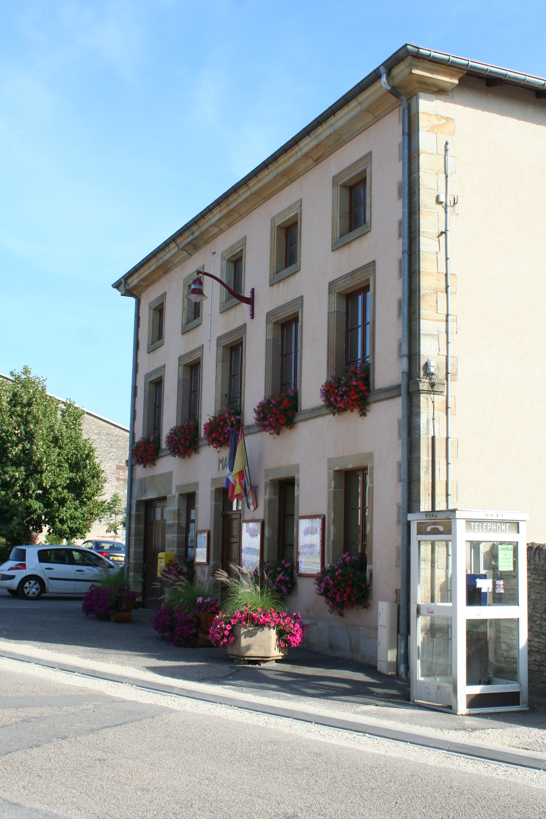 Mairie de Bult (Vosges) et cabine téléphonique